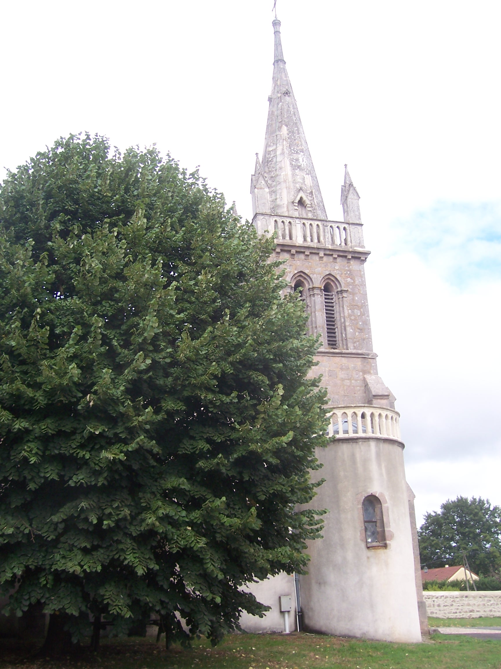 Eglise de Thil-sur-Arroux